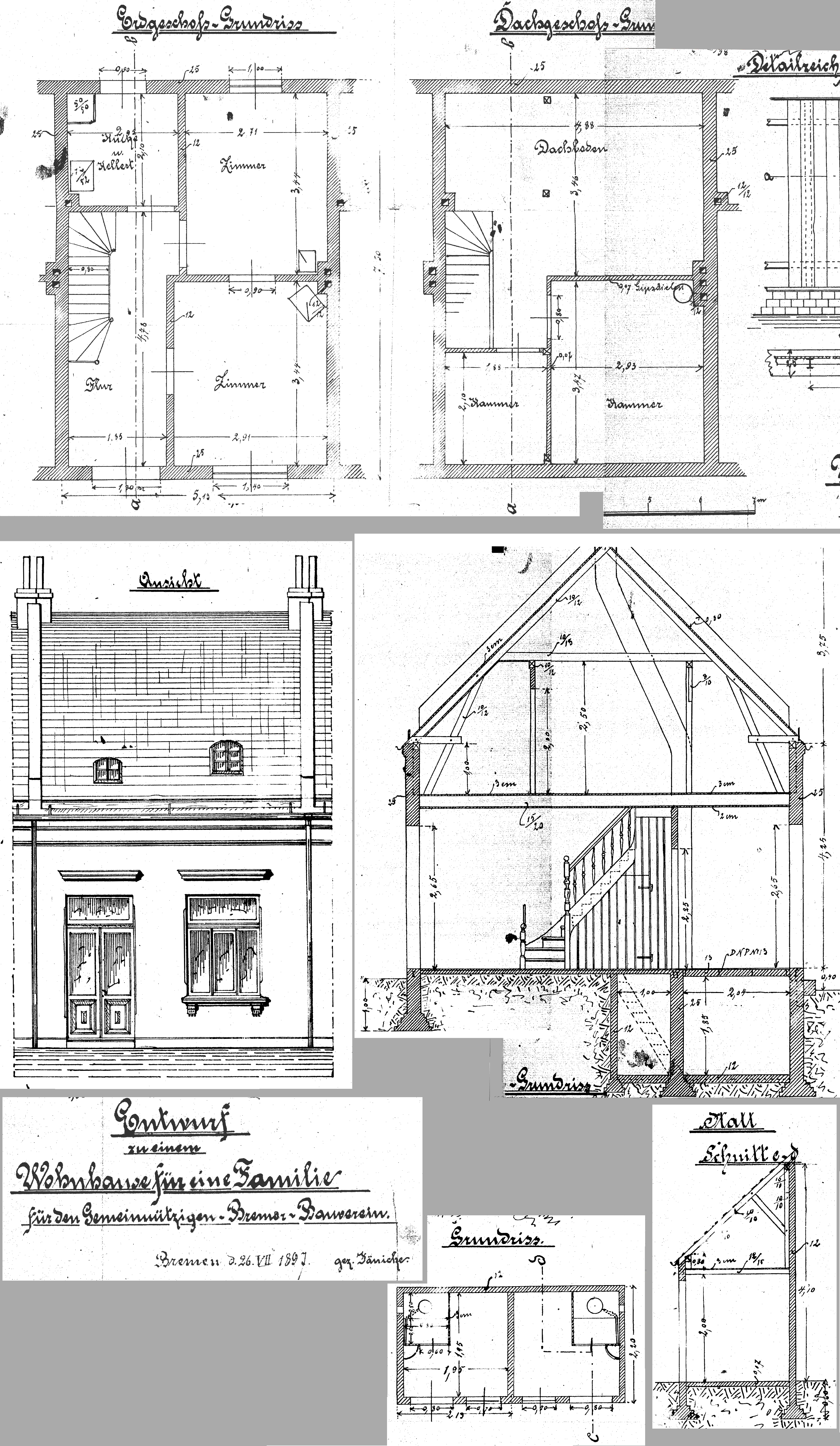 Blaupause eines Bremer Reihenhauses für Hafenarbeiter, das in Bremen-Walle im Generalsviertel steht.